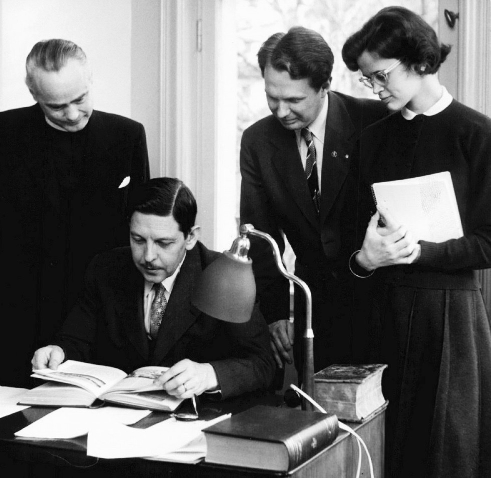 Överläkare Gösta Harding, sittande, omgiven av kyrkoherde Bengt Collste, kyrkoadjunkt Hans Sjöström och fröken Ebba Odencrants. En gång i veckan sätter sig ett 20-tal präster, kuratorer och jurister på skolbänken ett par trappor upp på Villagatan 15 i Stockholm för att utöka och fördjupa sina kunskaper i mentalhygien och psykiatri, och det kommer de att göra grundligt, ty inte mindre än två år ska denna kurs ta och det blir också möjligt för deltagarna att undergå muntlig eller skriftlig tentamen. Förmedlare av kunskaperna är överläkare Gösta Harding som på ett överskådligt och intressant sätt delar med sig av sina omfattande kunskaper.